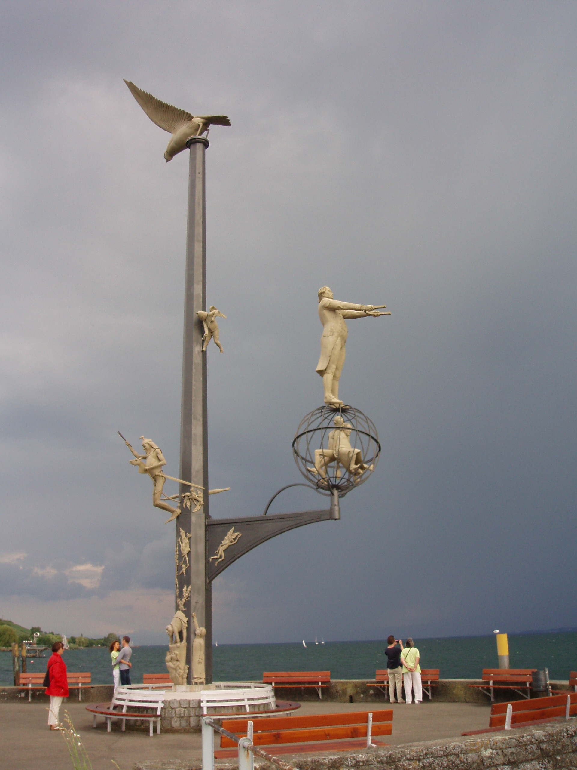 Magische Säule von Peter Lenk in Meersburg